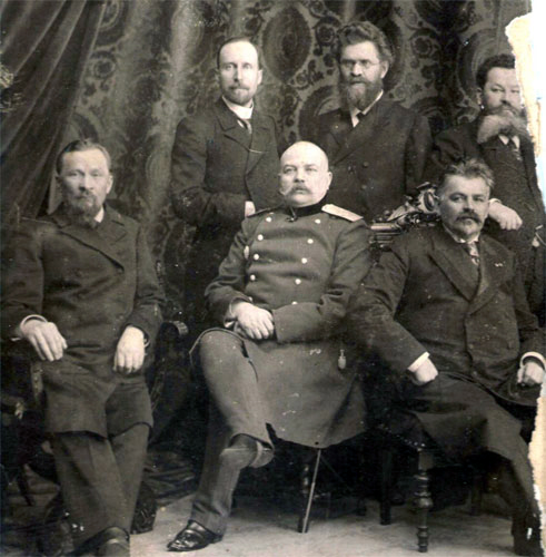 Александр Фомич Бабянский [в центре] (варианты фамилии Бабяньский и Бобянский; 16 июня 1853, Ковенская губерния — 10 декабря 1931, Варшава) — генерал-лейтенант, присяжный поверенный, лесовладелец, депутат III Государственной думы от Пермской губернии (1907—1912). Оригинал фотографии обнаружен в Свердловской области, в Саранинском музее, где до 1917 г. Бобянский А.Ф и его брат владели лесной дачей и разводили породистых лошадей.